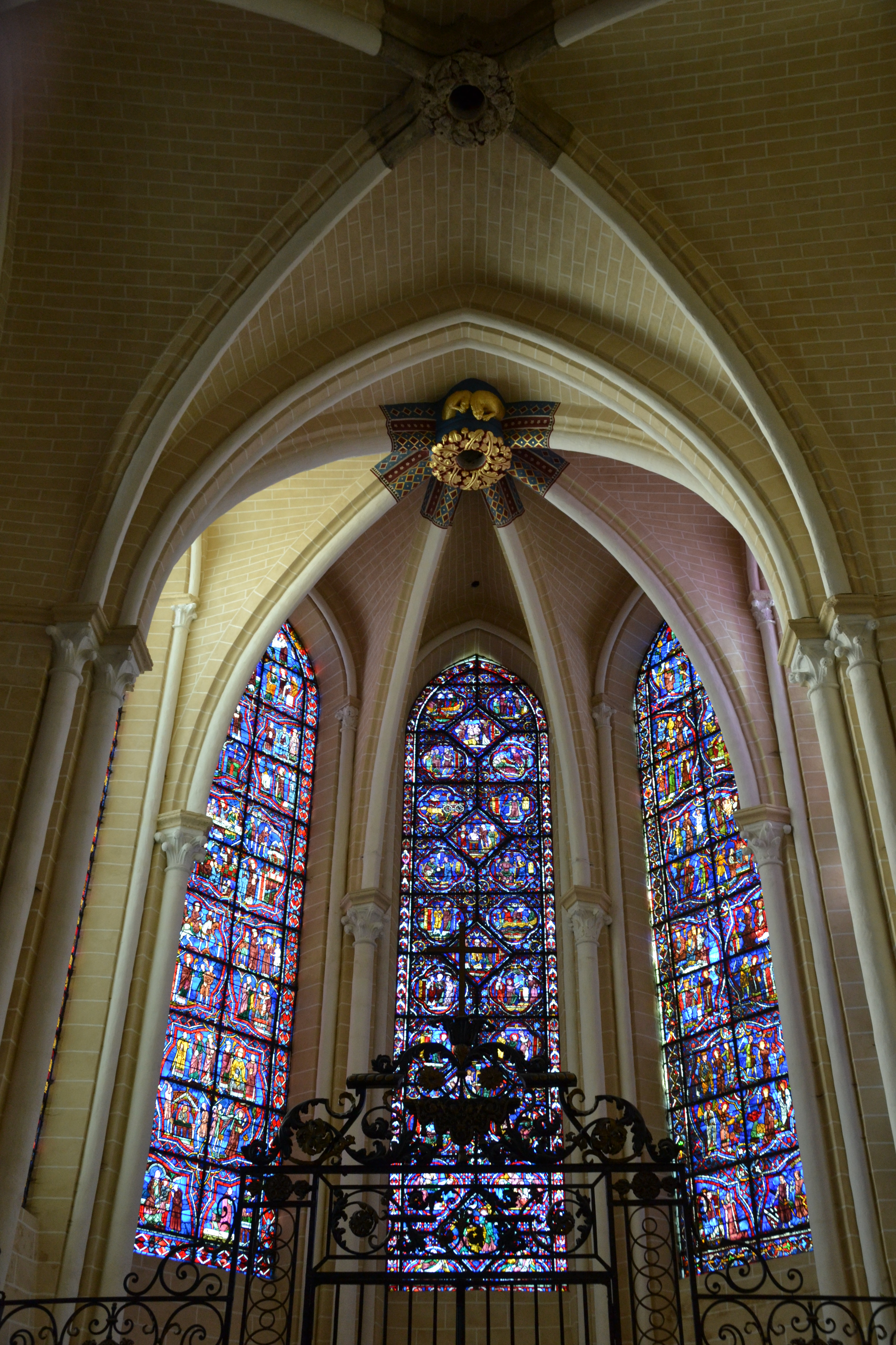 Cathédrale de Chartres (Classé, 1862)